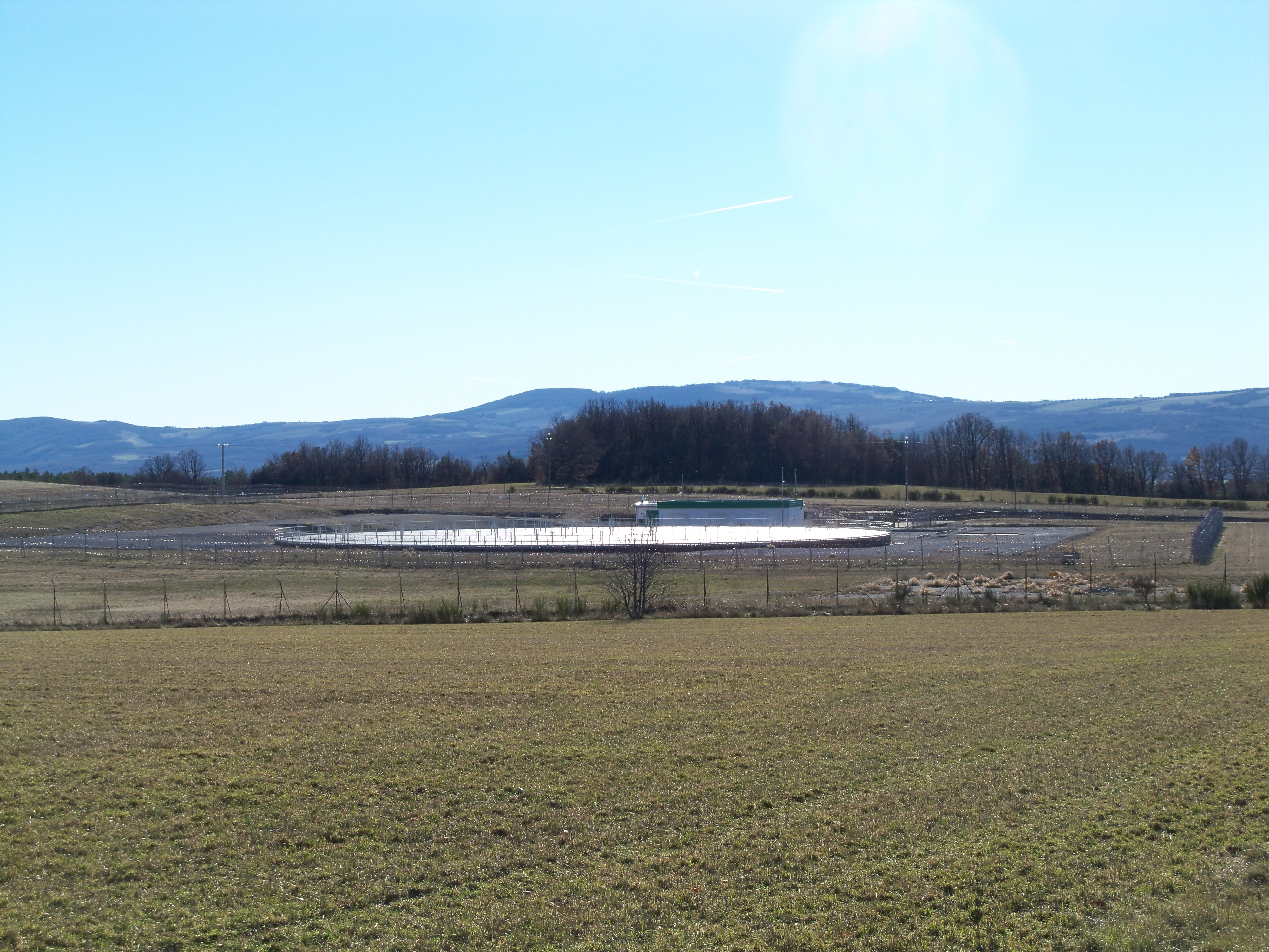 Ancien silo militaire transformé, plateau d'albion